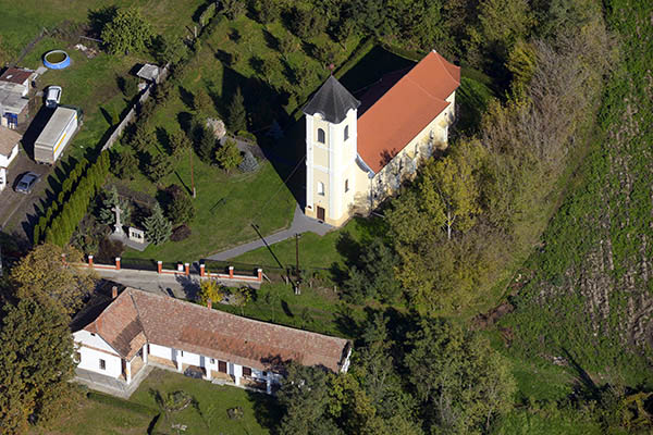 Szent György templom, Jászfelsőszentgyörgy